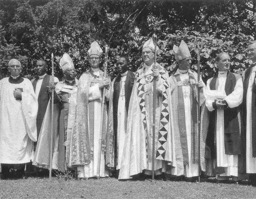 Biskopsvigning av Bengt Sundkler i Tanganyika 1961. Sundkler i mitten, Bo Giertz fjärde från vänster.